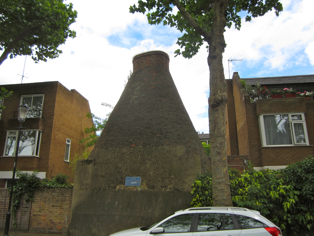 Old kiln in Notting Dale